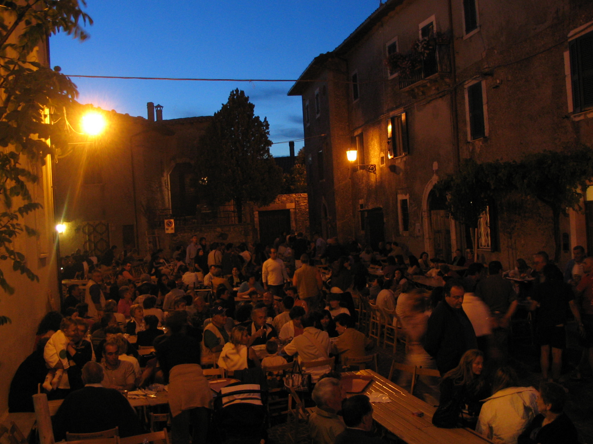 Oricola, Abruzzo, Italia